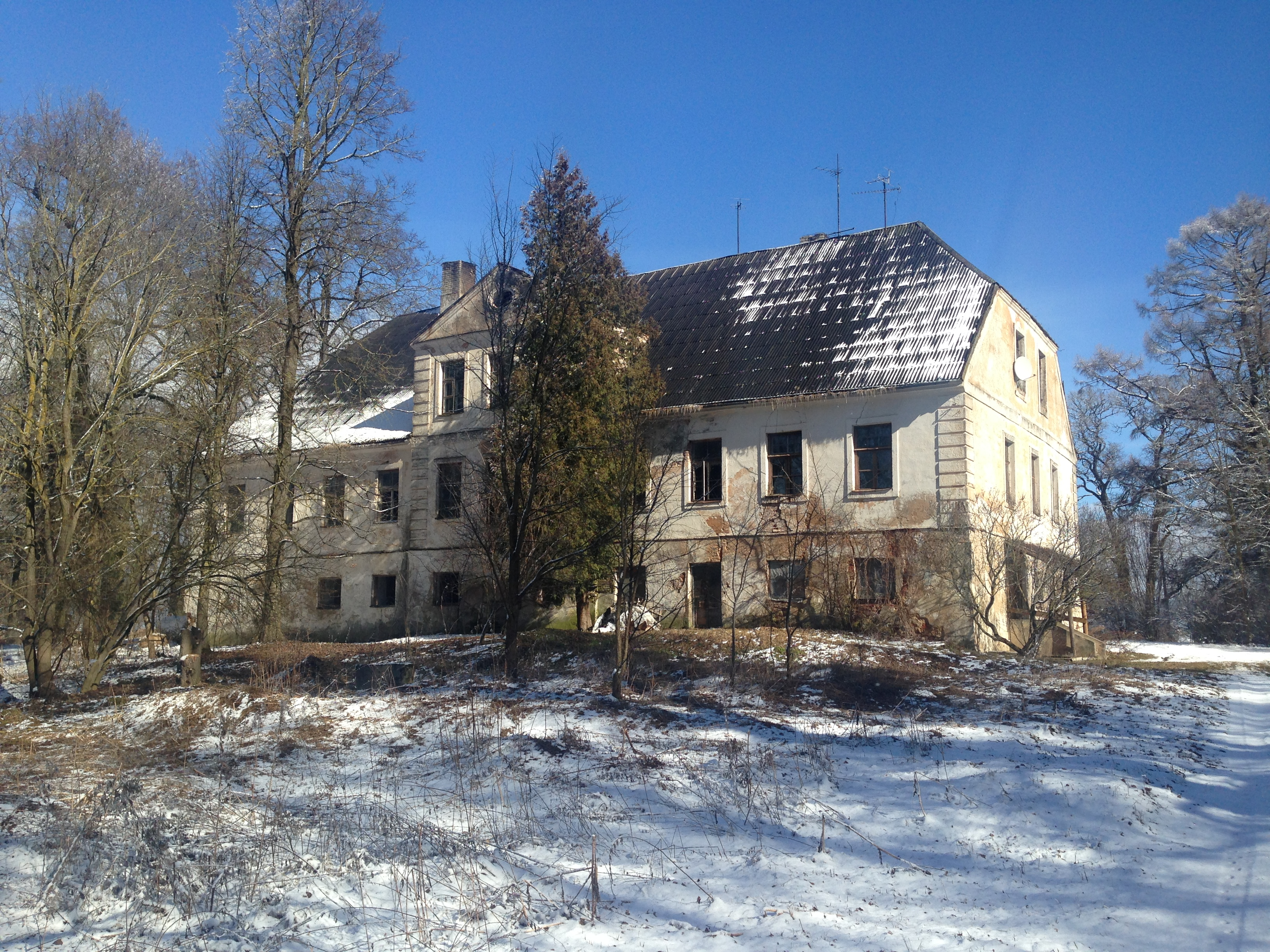 Bērzmuižas kungu māja (vēlāk arī skola un dzīvojamais nams)